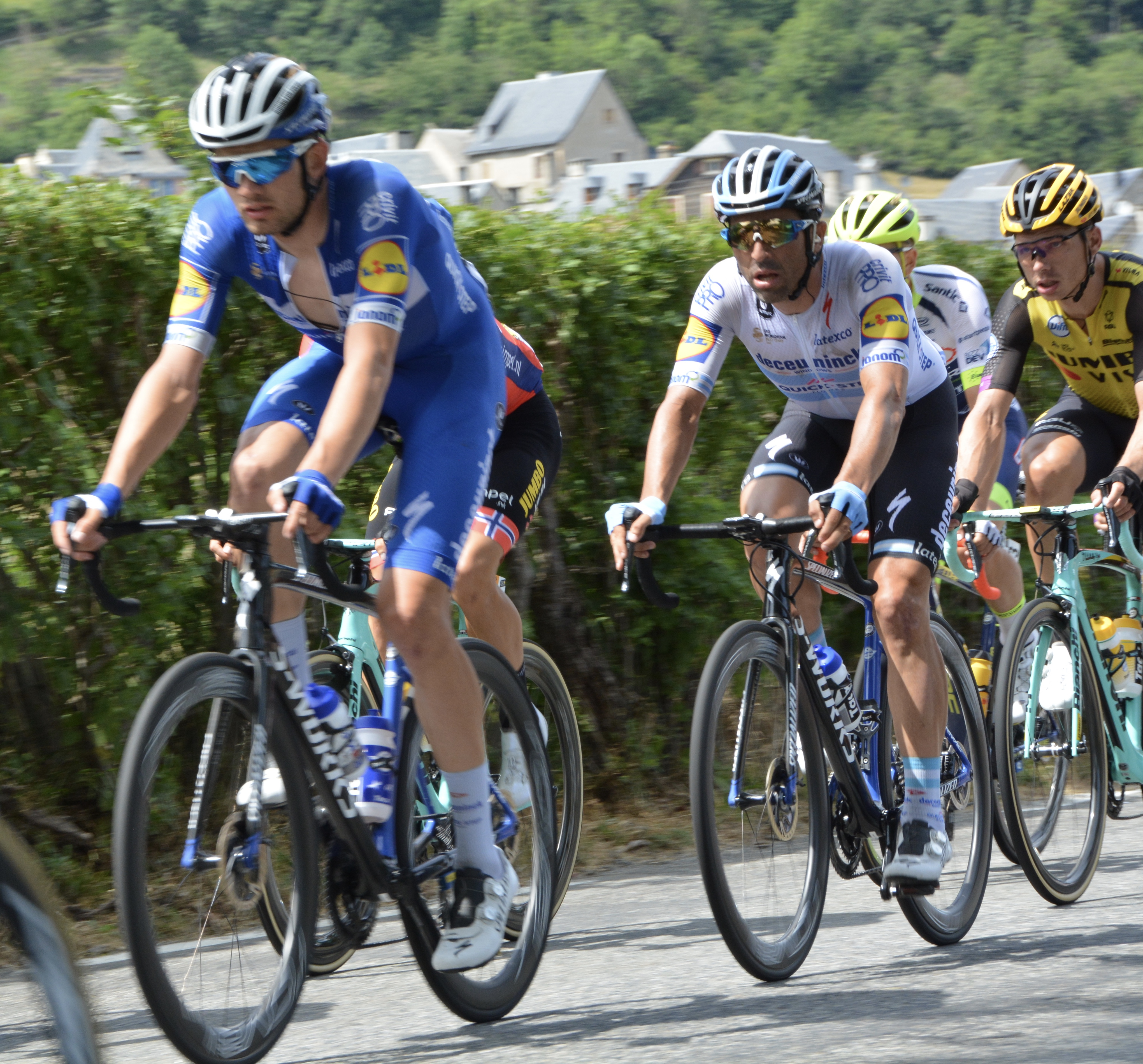 Tour de France, 18 July 2019_0104